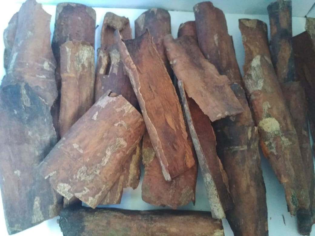 kulit kayu akway Papua